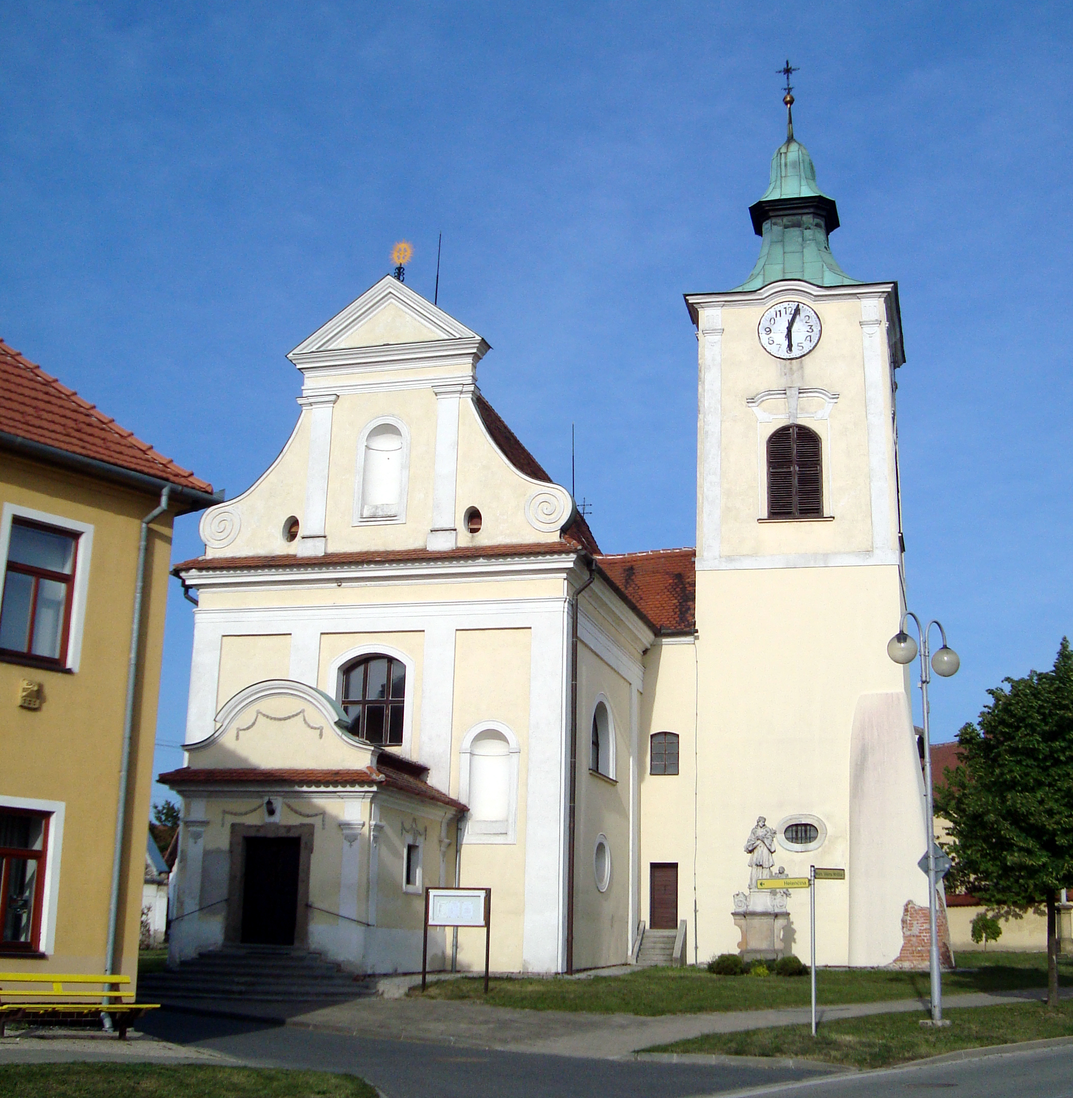 Ostrovačice kostel sv. Jana Křtitele a sv. Václava